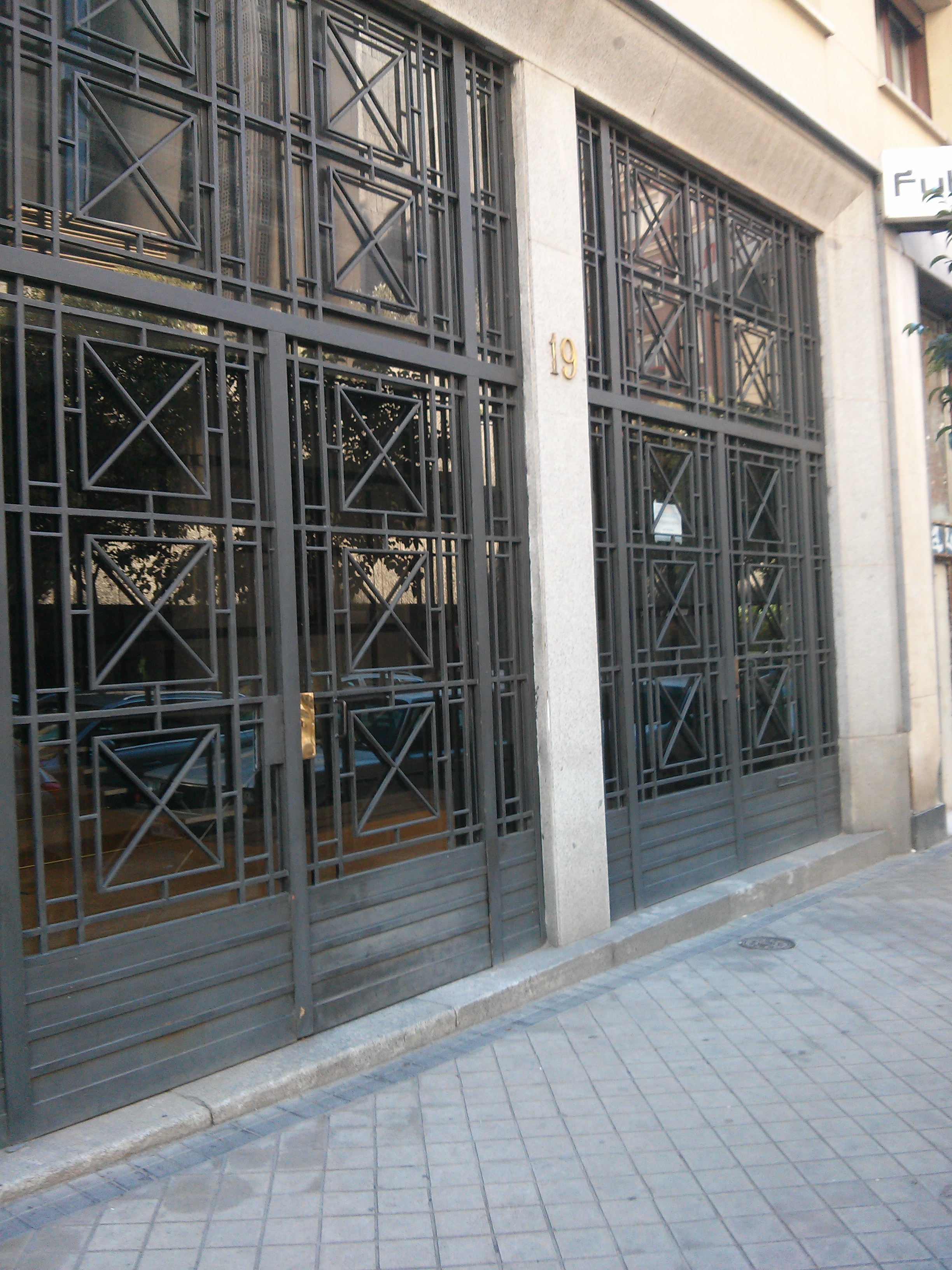 Portal de la calle Antonio Acuña, nº 19, Madrid, España.